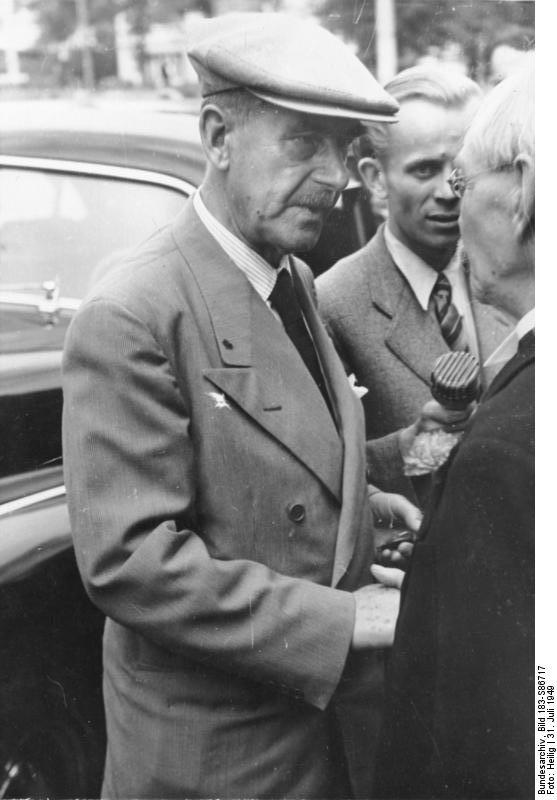 Illus - Heilig Thomas Mann in Weimar Am Sonntag Nachmittag (31.7.1949) traf Thomas Mann, aus Westdeutland kommend, in Weimar ein, wo er vor dem Hotel "Augusta" durch den thüringischen Ministerpräsidenten Eggerath und Frau Dr. Thorhorst begrüßt wurde. UBz: Thomas Mann wird von seinen engeren Freunden aus Zurich begrüßt. 1.8.1949 3658-49